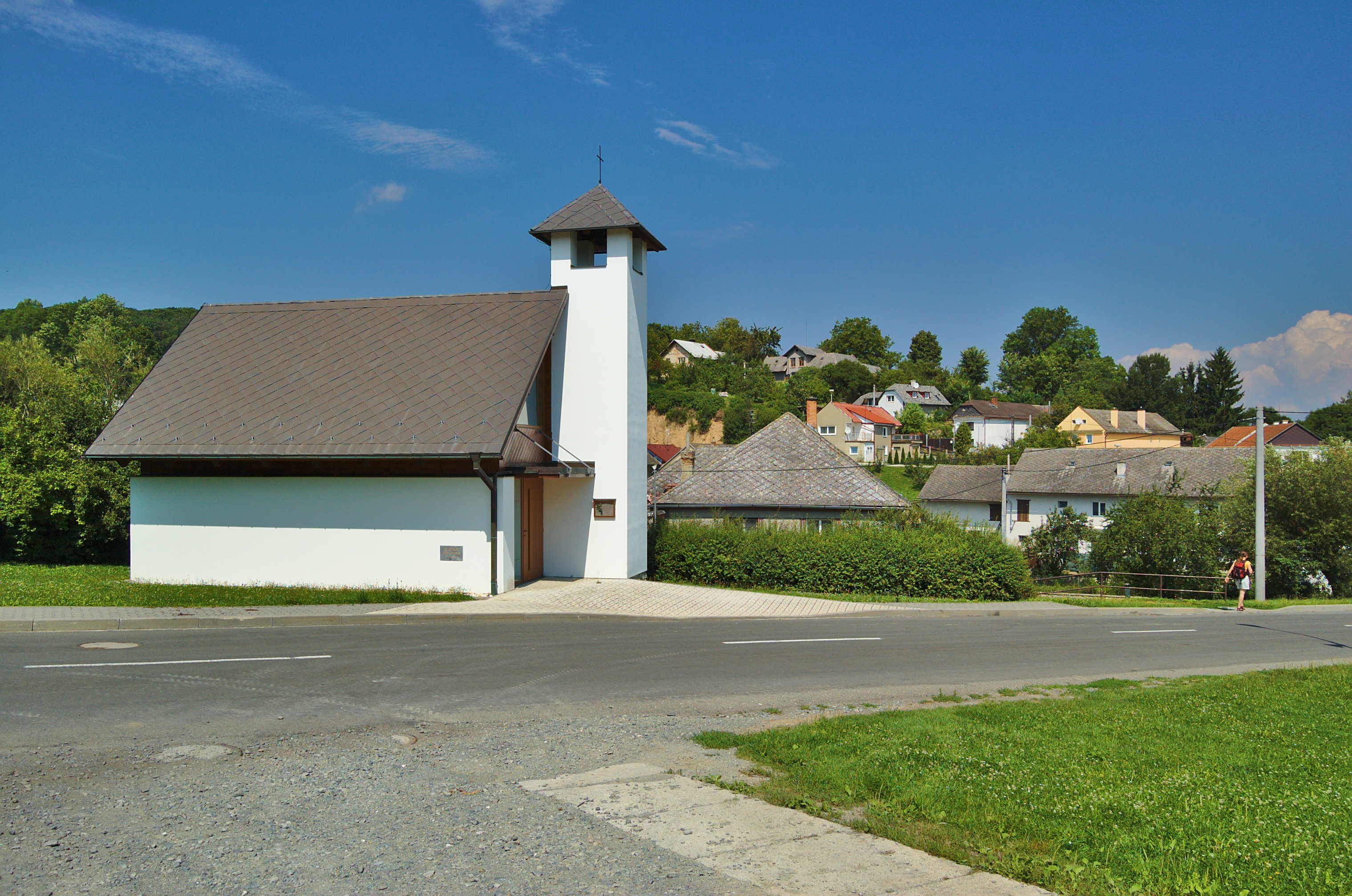 Kaple svatého Floriána, Mladeč, okres Olomouc